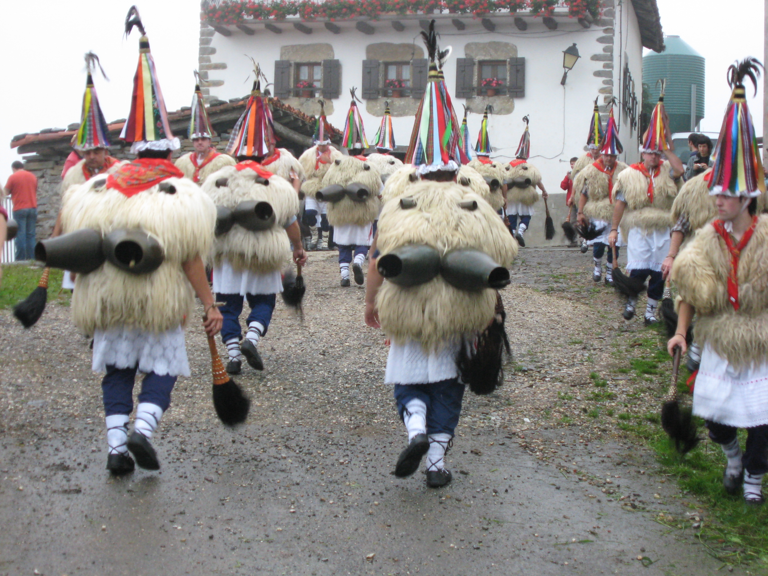 Ioaldunak à Ituren (Navarre).